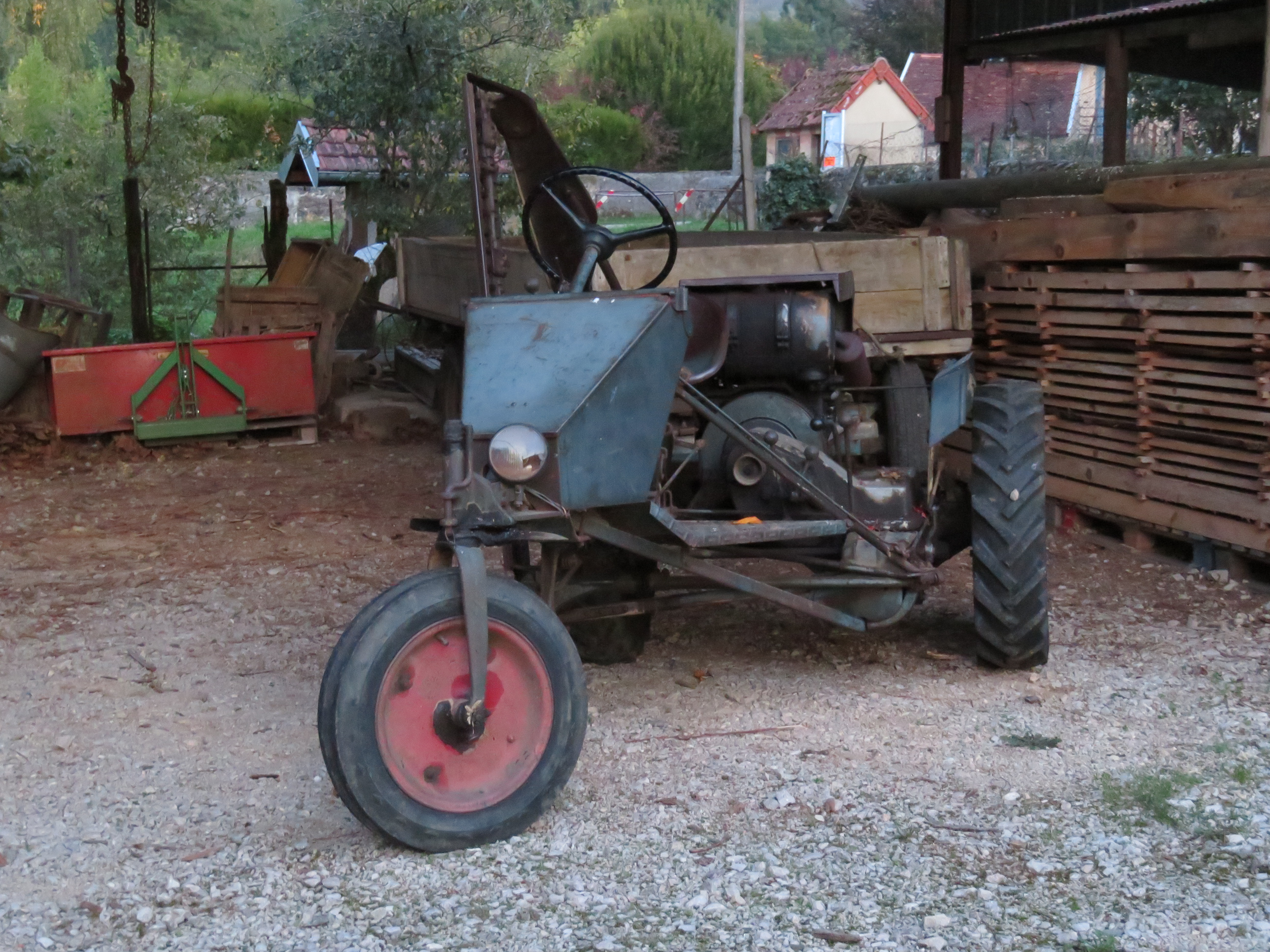 Tracteur Kiva photographié à Cesancey.